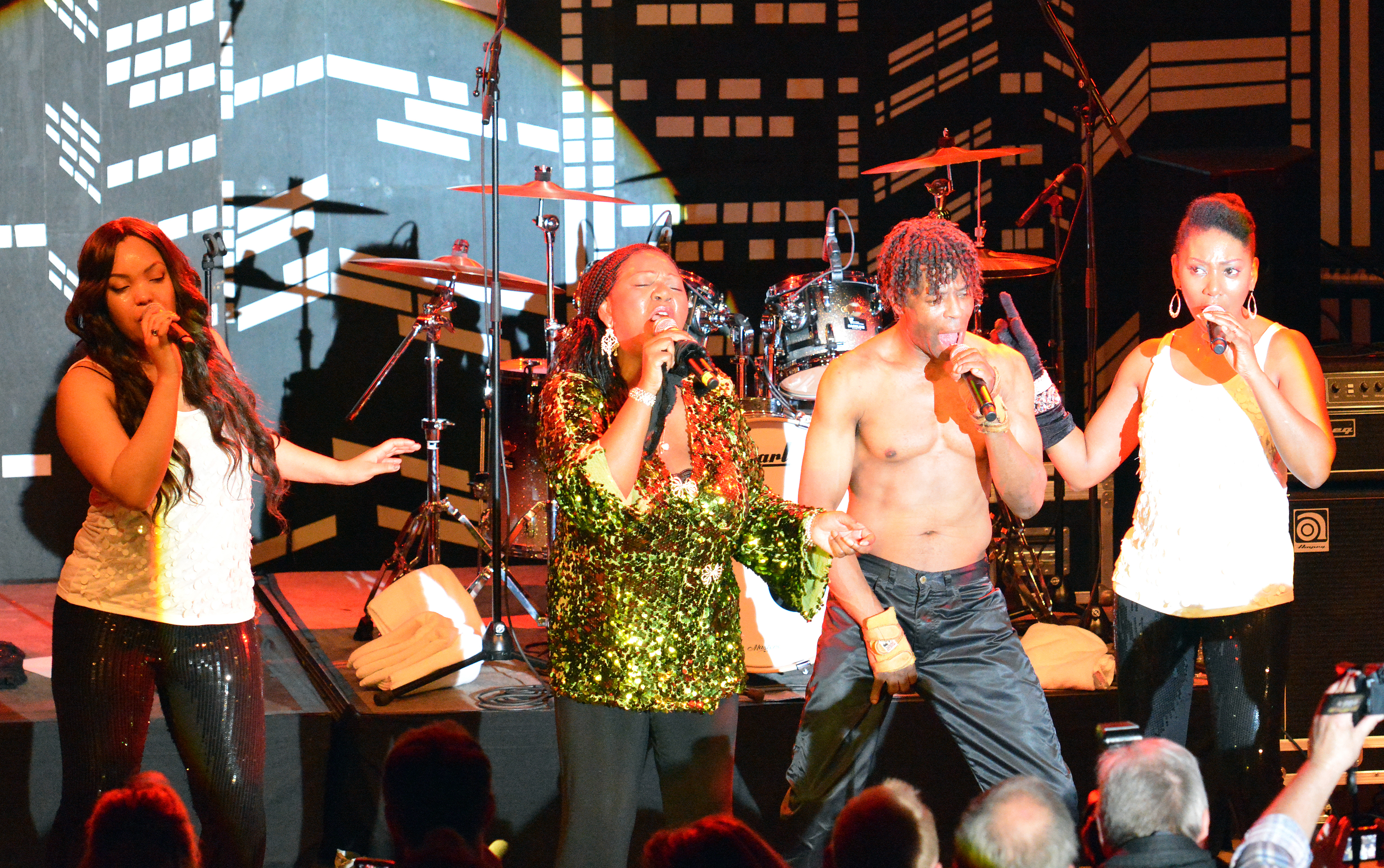 Boney M. feat. Liz Mitchel bei Appen musiziert 2014